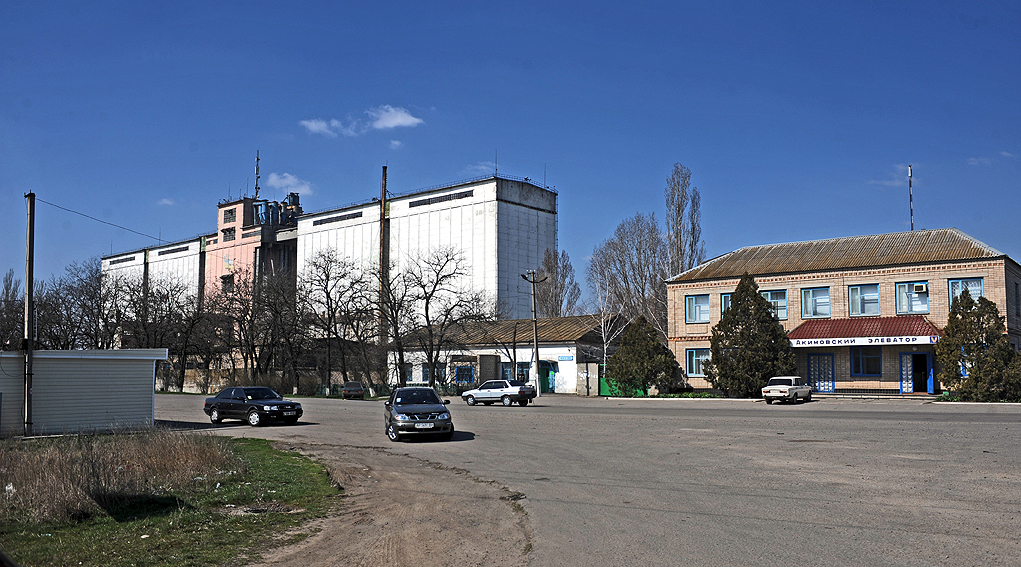 Элеватор в пгт Акимовка Запорожской области, Украина